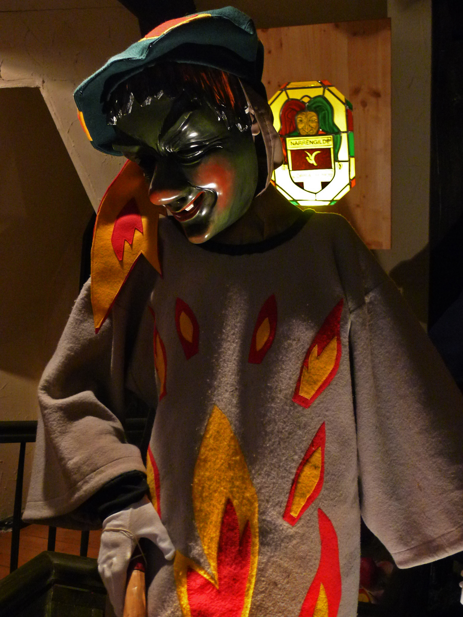 Irrlicht - Häsfigur der Narrenzunft Hausen im Wiesental, hier in der Oberrheinischen Narrenschau Kenzingen ausgestellt